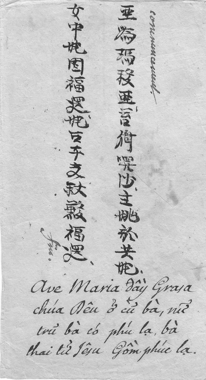 Prière de l'Ave Maria